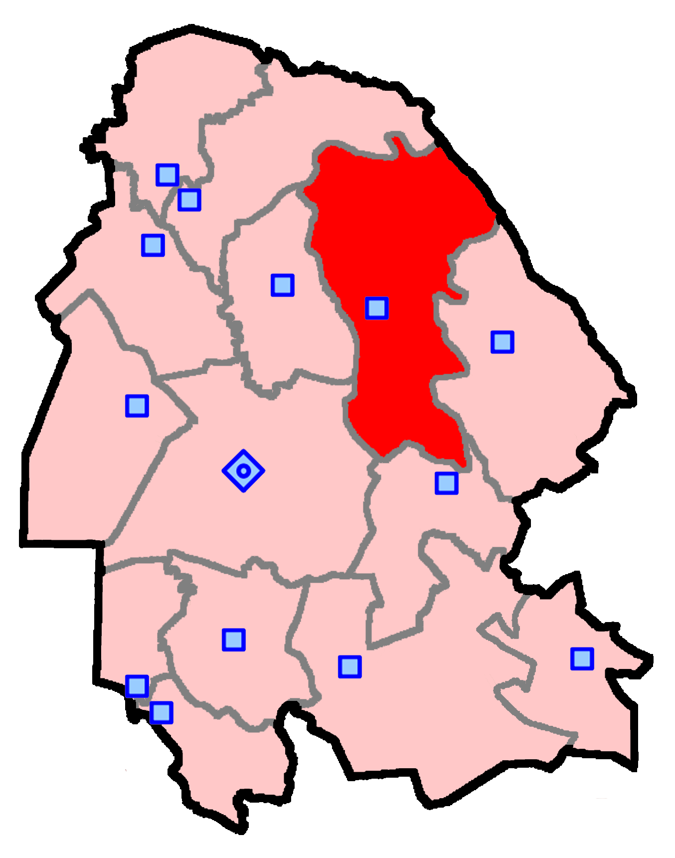 حوزهٔ انتخاباتی مسجدسلیمان و لالی و هفتکل و اندیکا برای انتخابات مجلس شورای اسلامی